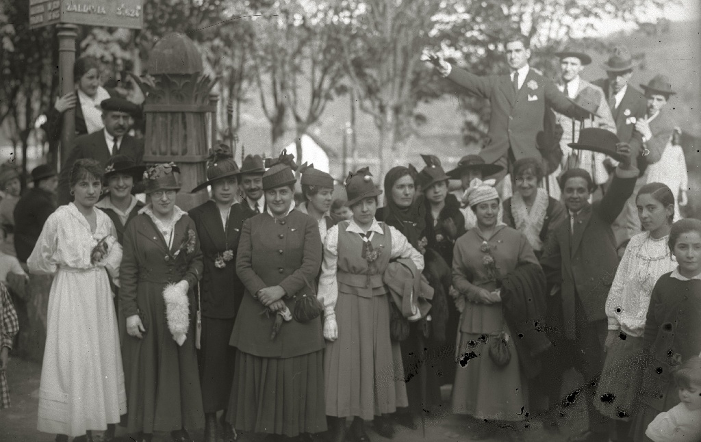 Título original: Grupo de personas por las calles de Ordizia (1/3) Localización: Ordicia (Guipúzcoa)